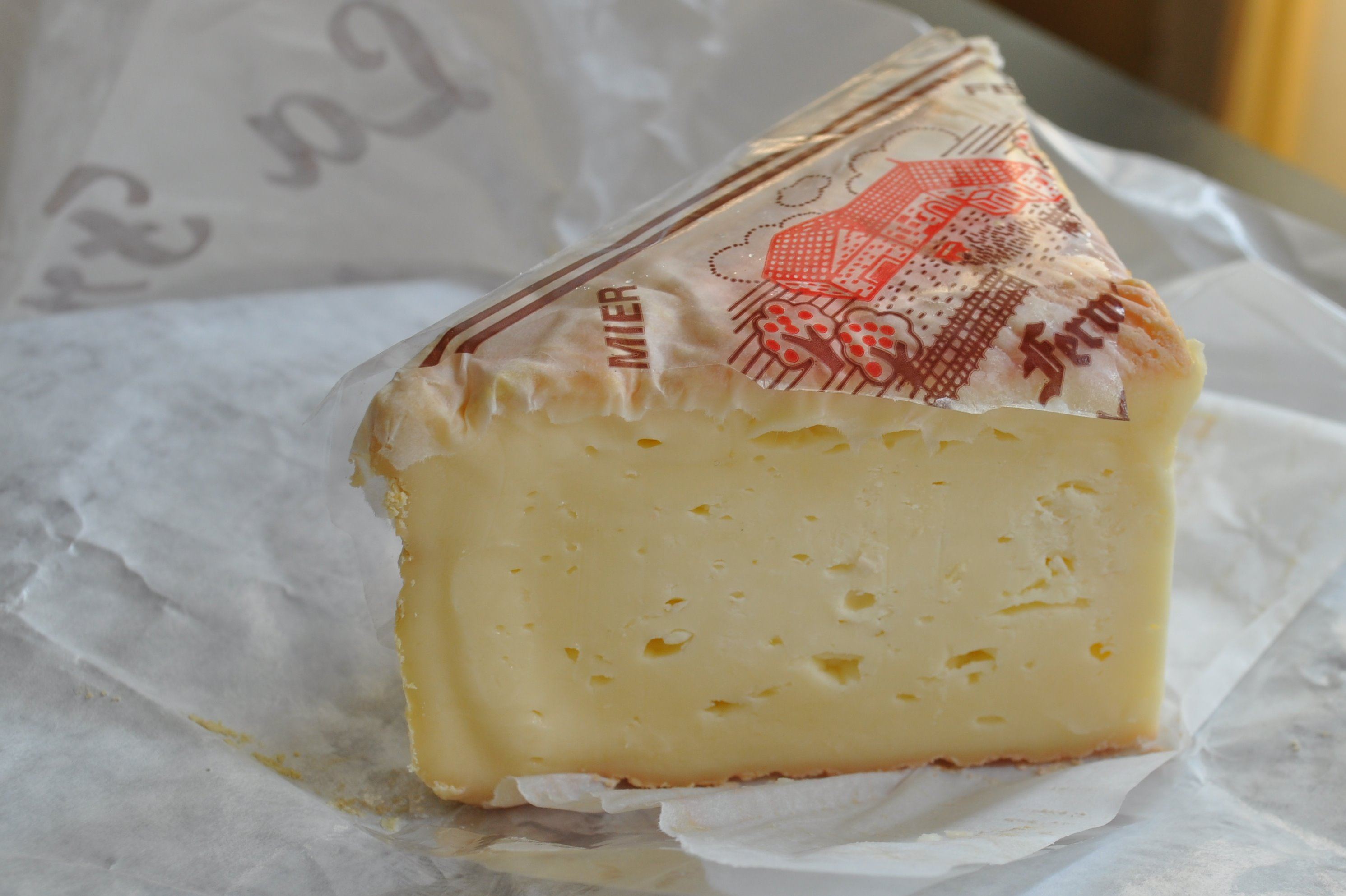 Un quart de Maroilles